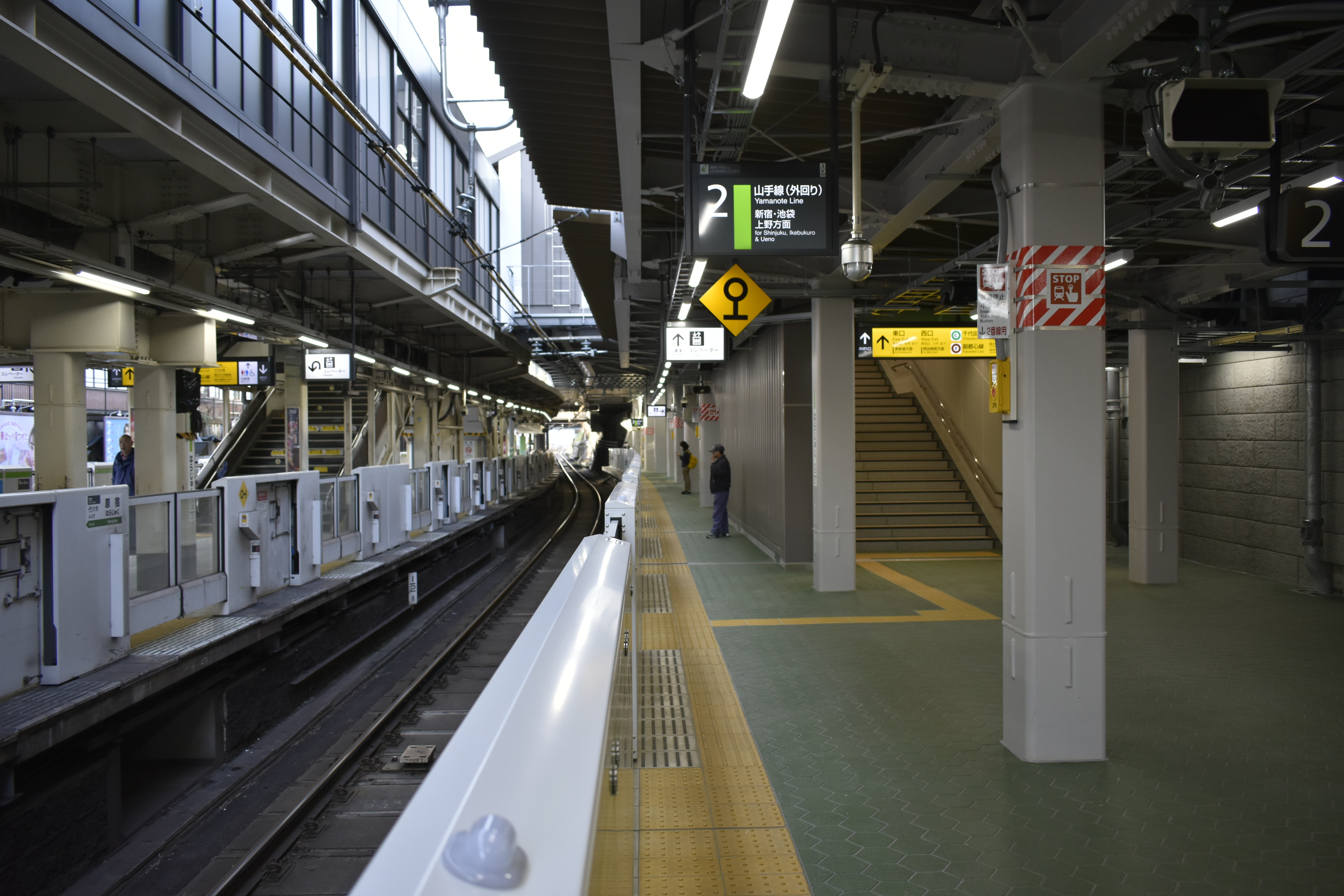 原宿駅 新駅舎 Nikon D3400